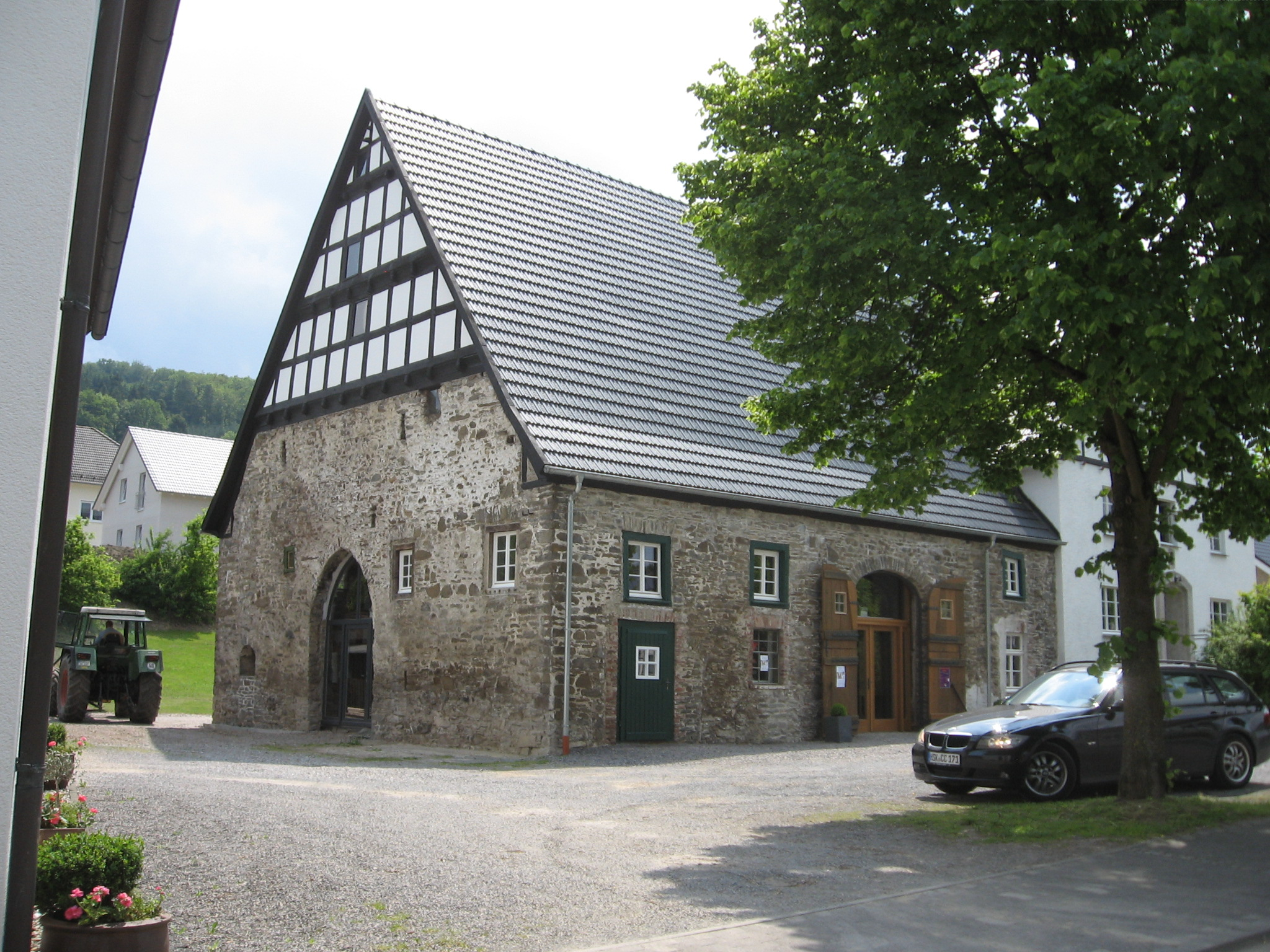 Strackenhof Sundern-Endorf von Nordosten. Im Bild der älteste Hofteil.